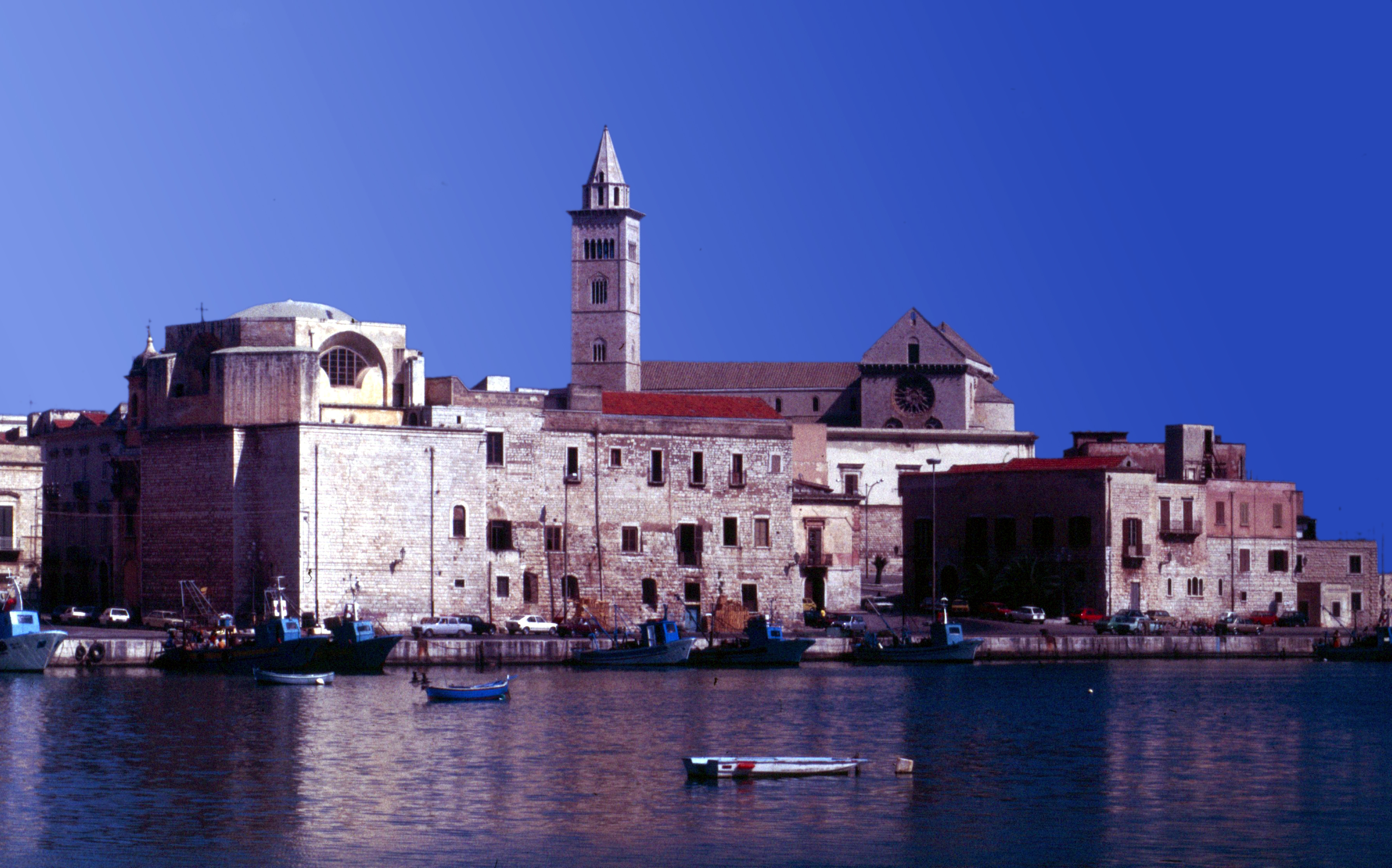 Dom von Trani in Apulien